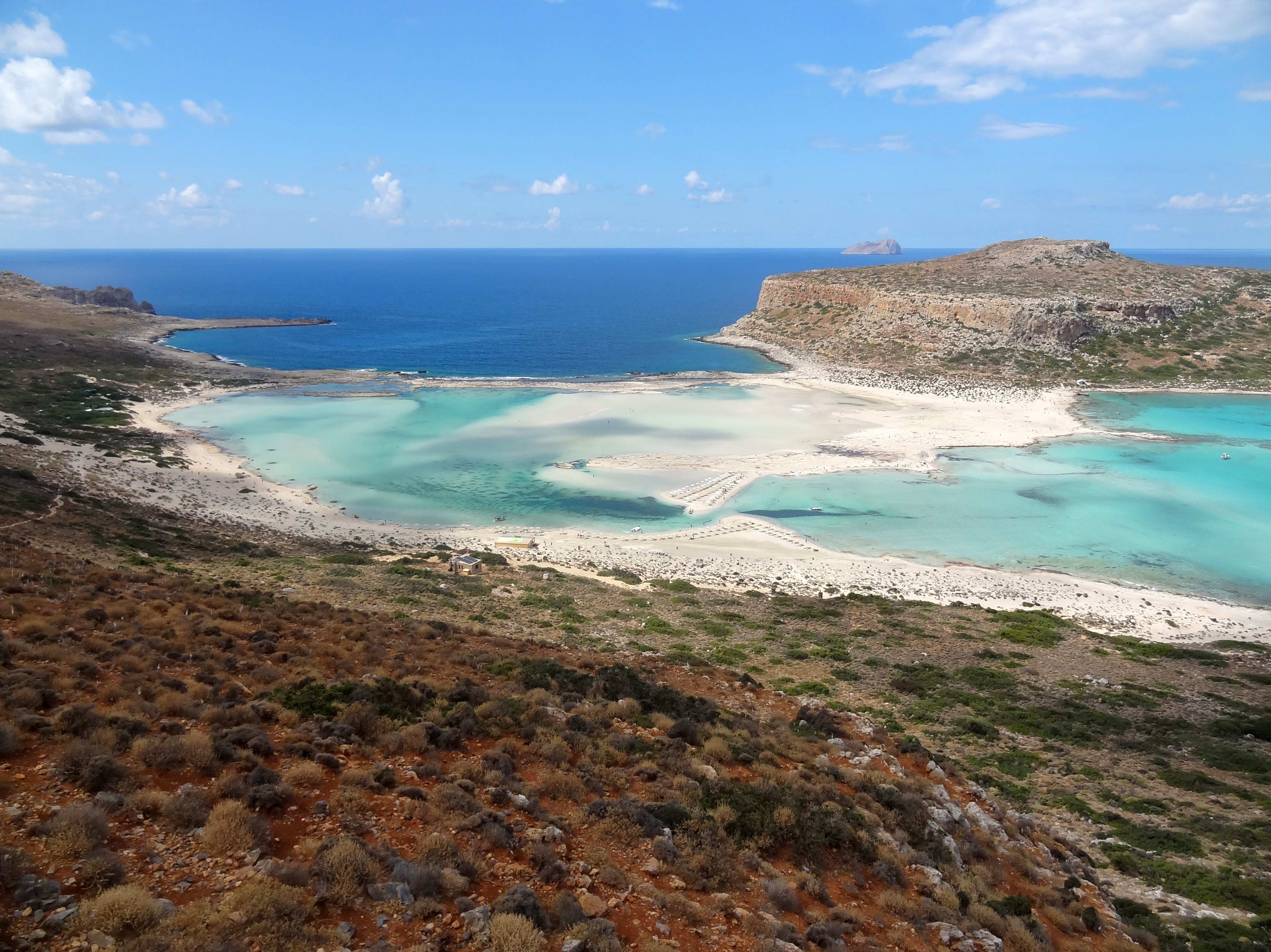 Strand von Balos (Μπάλος) auf der Halbinsel Gramvousa, Gemeinde Kissamos, Regionalbezirk Chania, Kreta, Griechenland